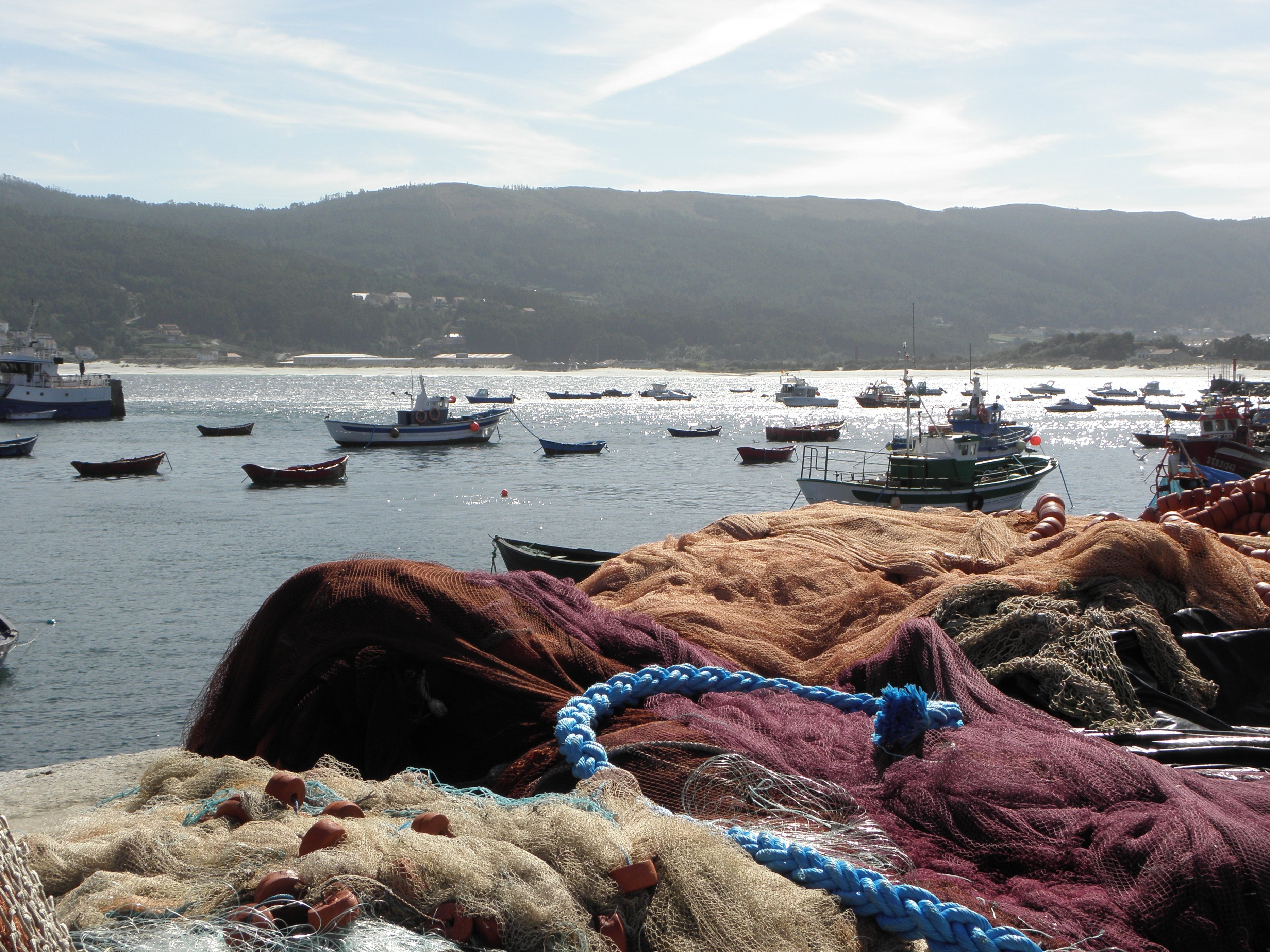 Laxe, Costa da Morte